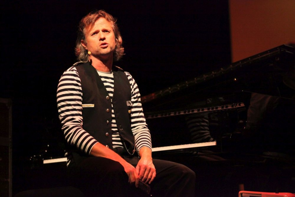 De Georges Urwald am Januar 2017, Photo: Jang Gaspar